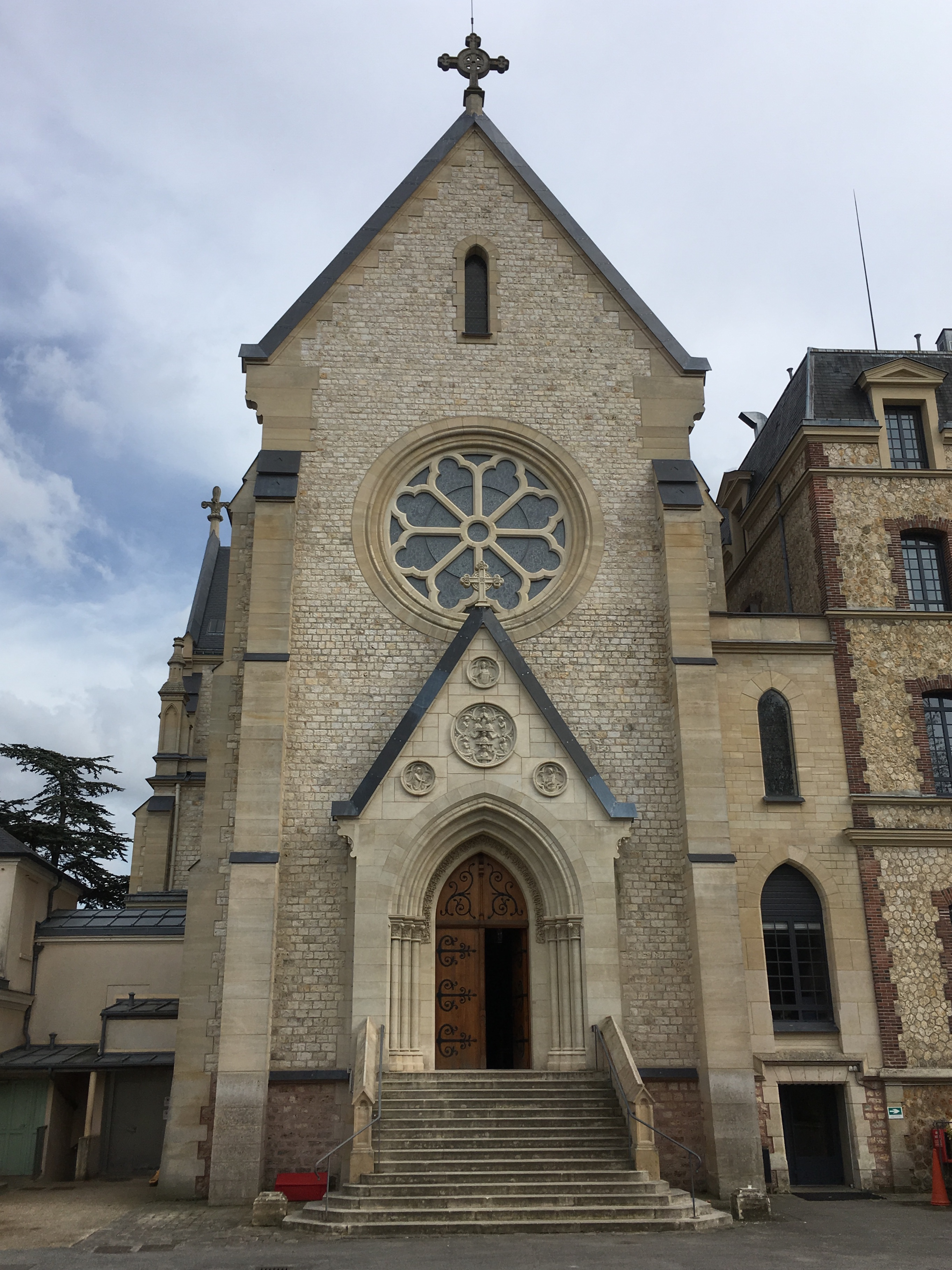 Entrée de la chapelle du Lycée Sainte-Geneviève